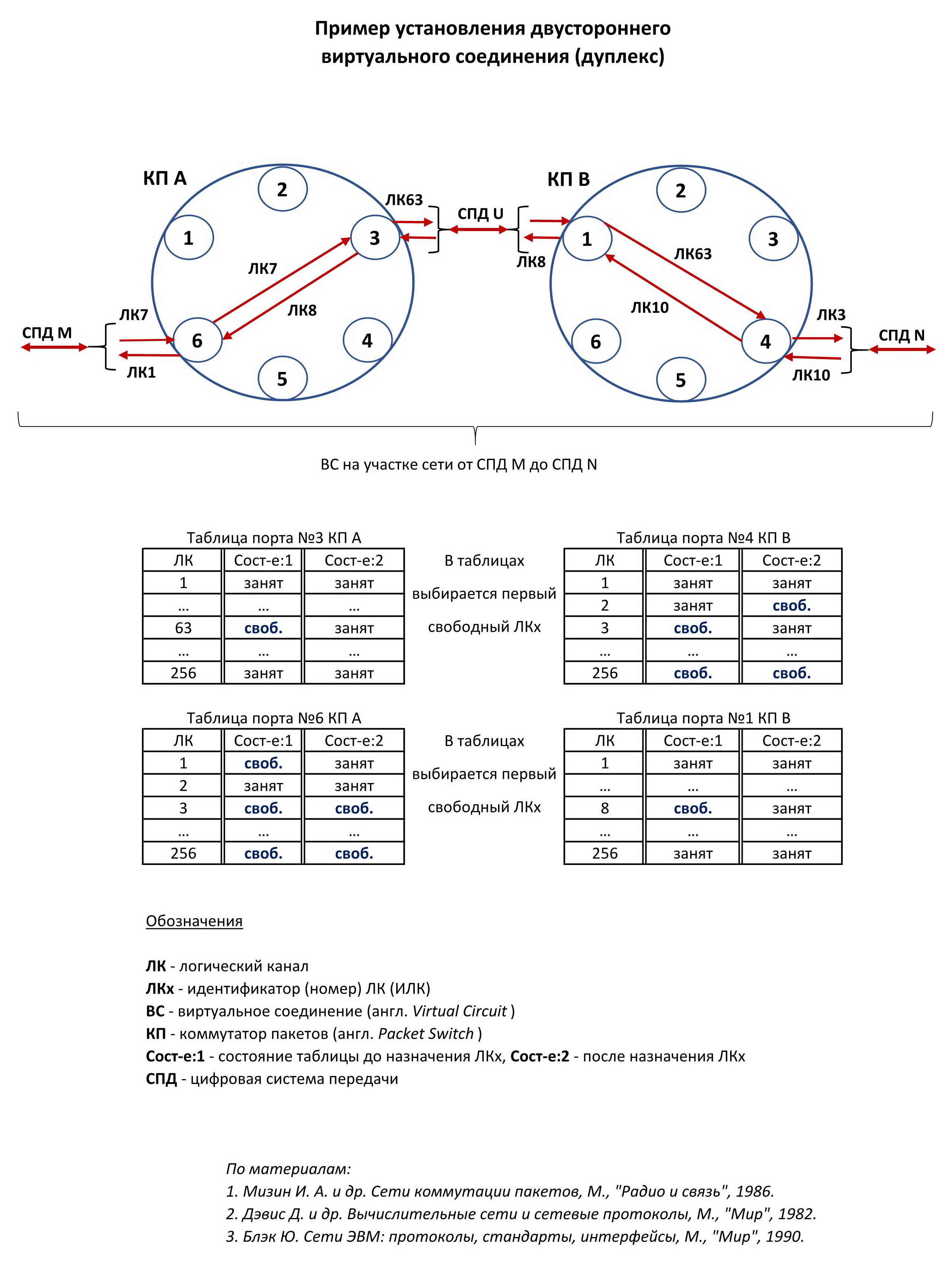 Пример установления коммутируемого двустороннего (дуплексного) виртуального соединения на участке сети с коммутацией пакетов.